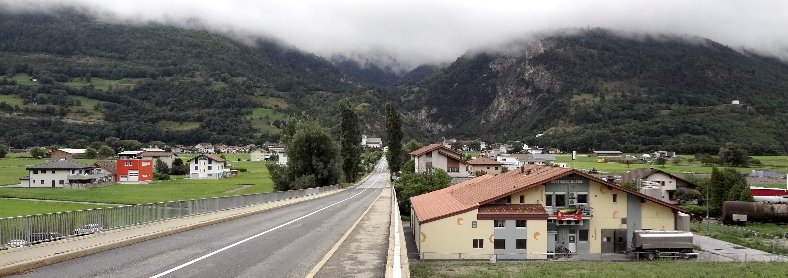 Vue sur le village de Tourtemagne, depuis le pont surplombant la gare.